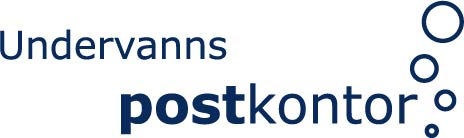 Risør Undervannspostkontor logo